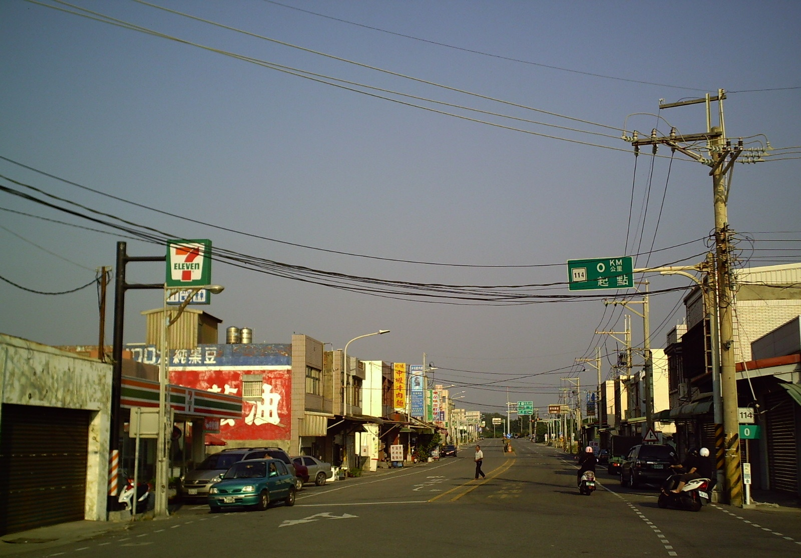 臺灣市道114號起點，位於桃園市新屋區永安漁港前。